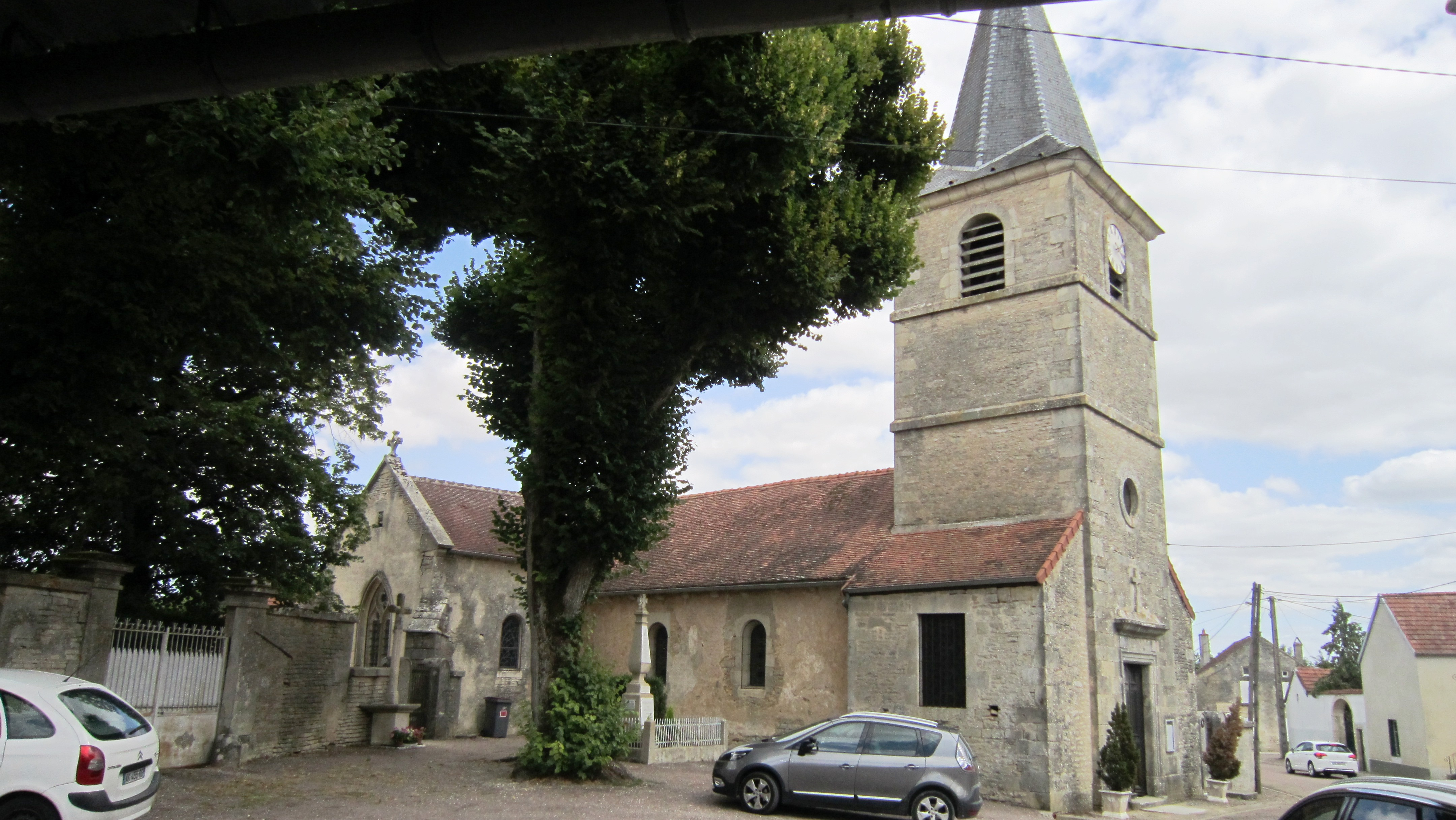 Eglise de Verdonnet